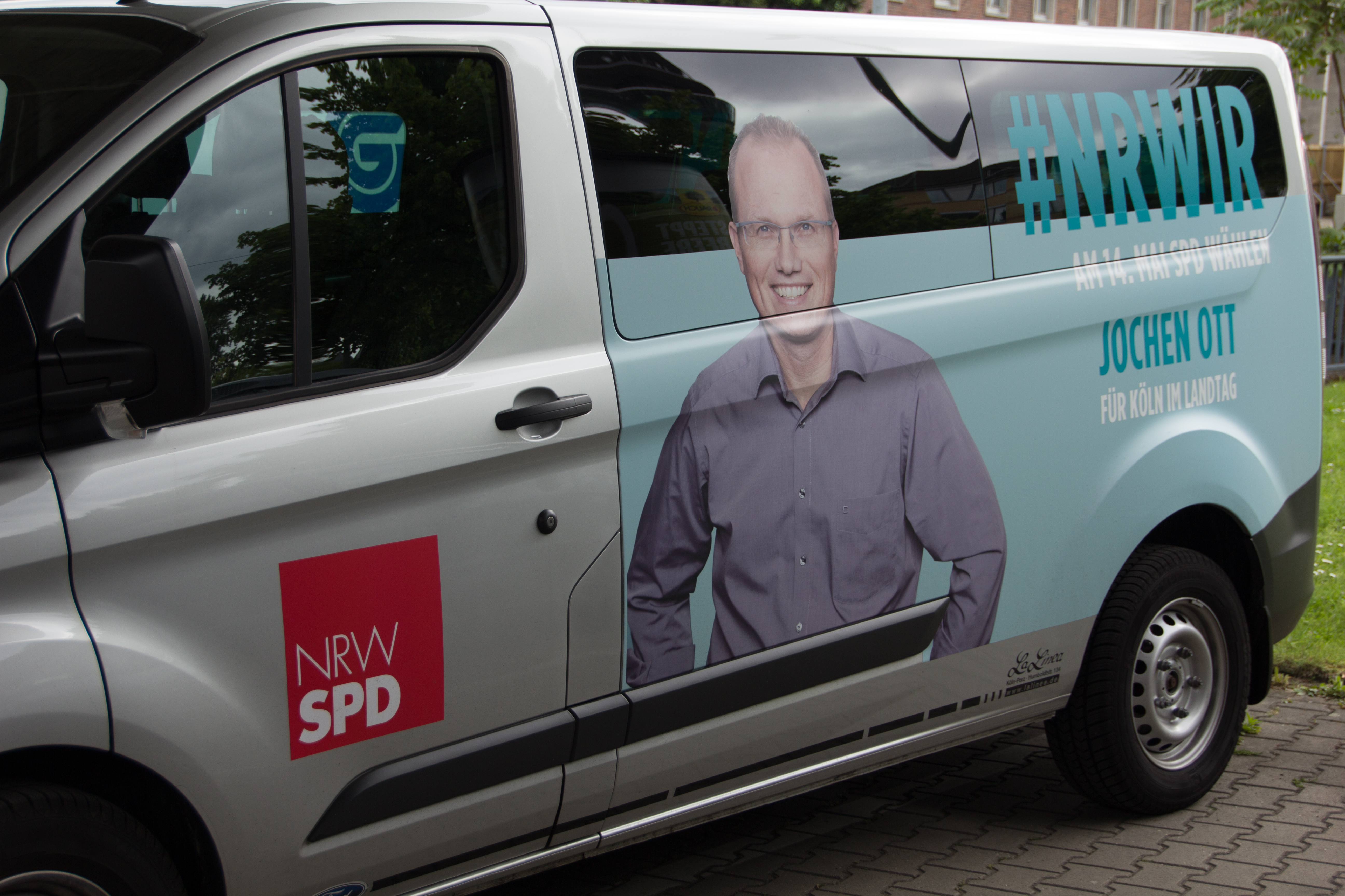 Wahlparty der SPD am Wahlabend der NRW Landtagswahl am 14. Mai 2017 in Düsseldorf